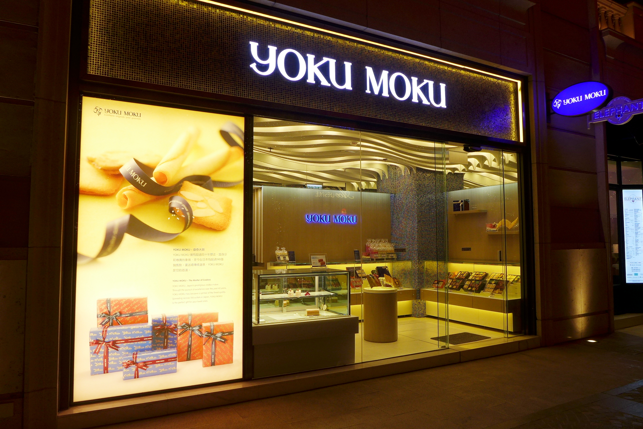 YOKU MOKU in Lee Tung Avenue